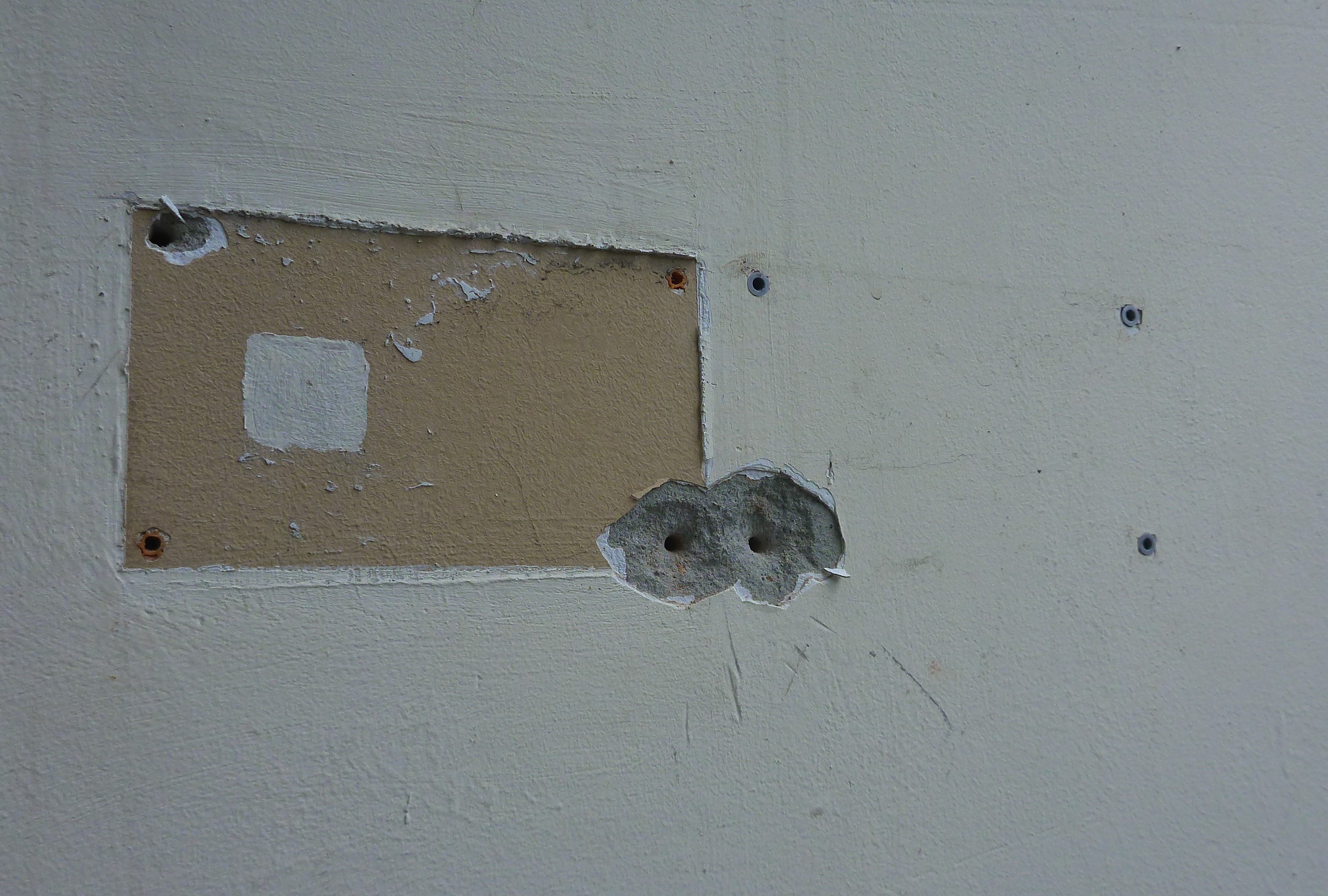 Стена после снятия табличек Последний адрес - дома по улице 8 марта 1, Екатеринбург 11 июня 2020 года